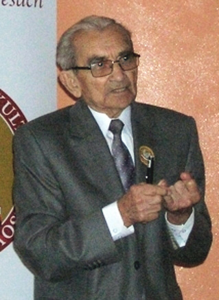 Prof. Władysław Filar, historyk wojskowości.